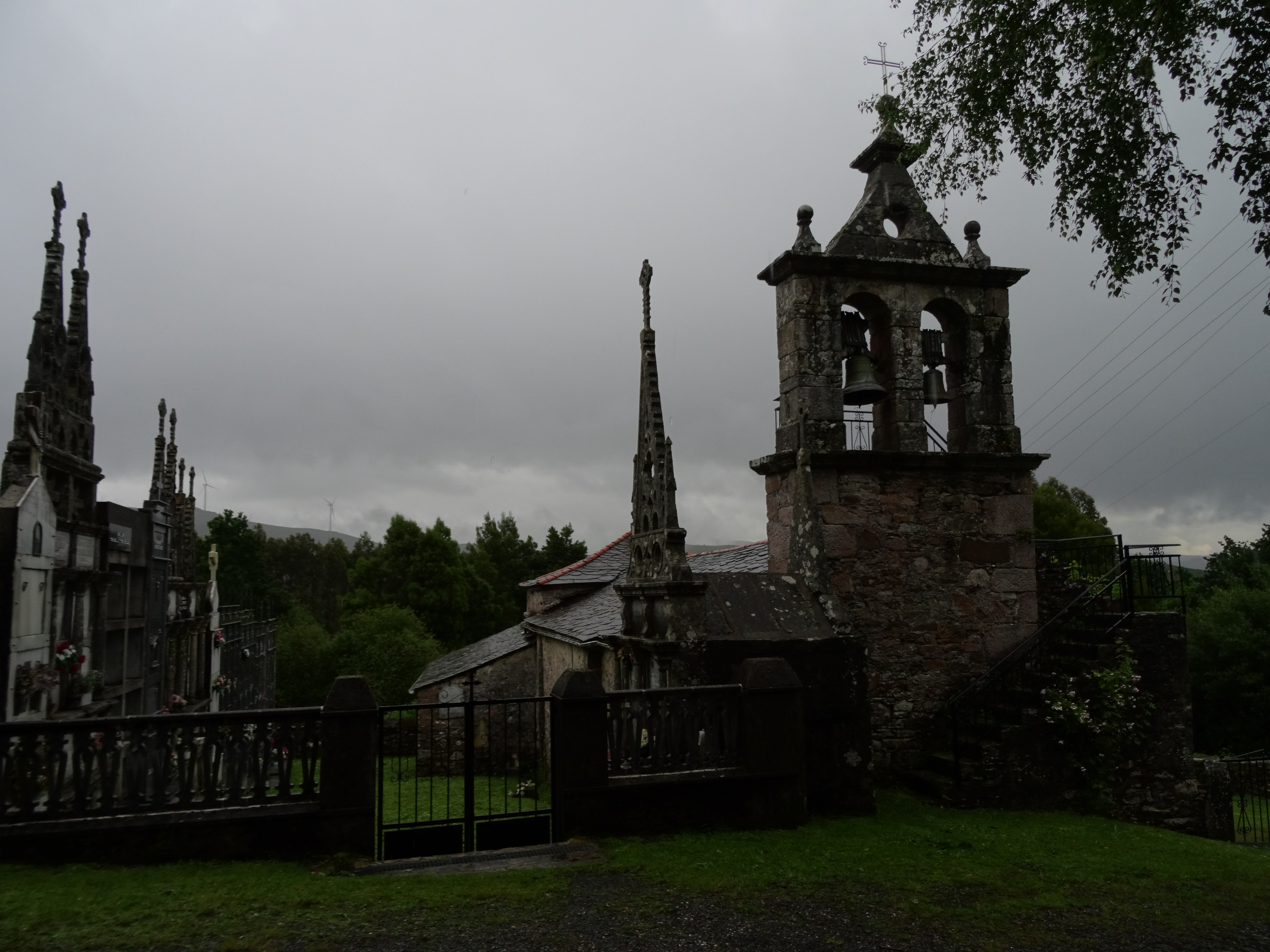 Ver título.